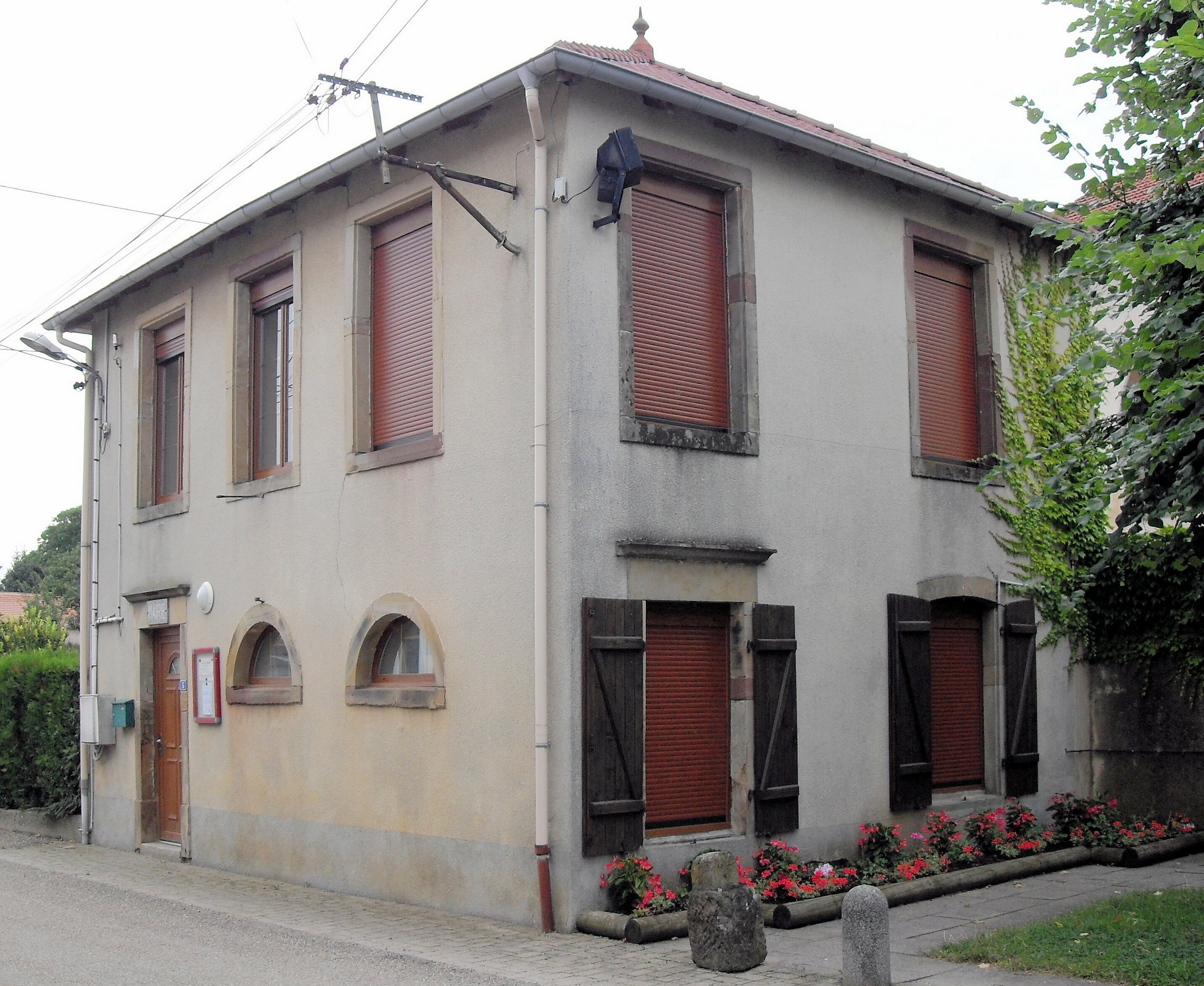 La mairie de Mazirot